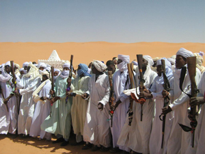 رقصة البارود ل احدى قصور ادرار